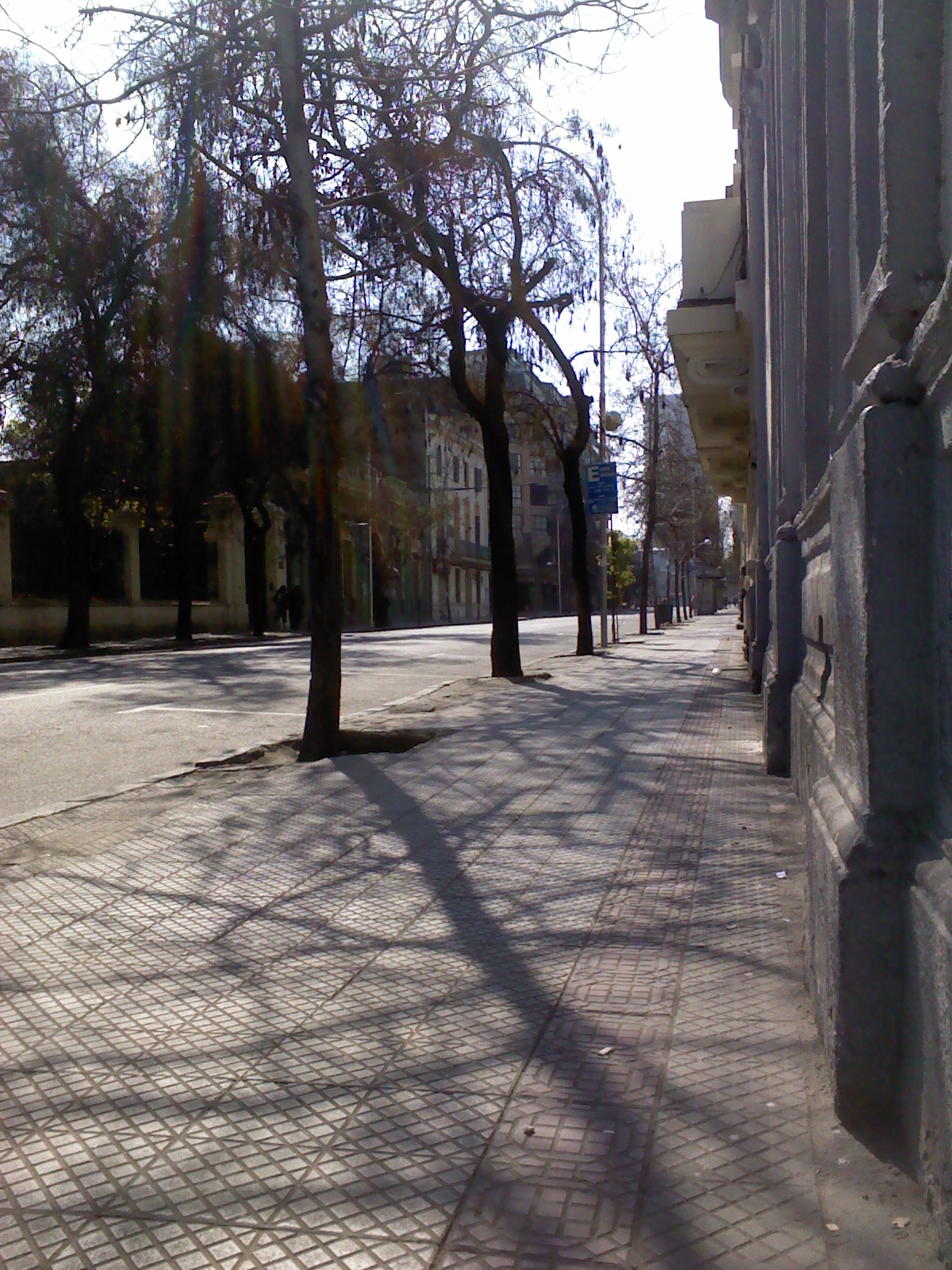 vista de la calle dieciocho llegando a Alameda